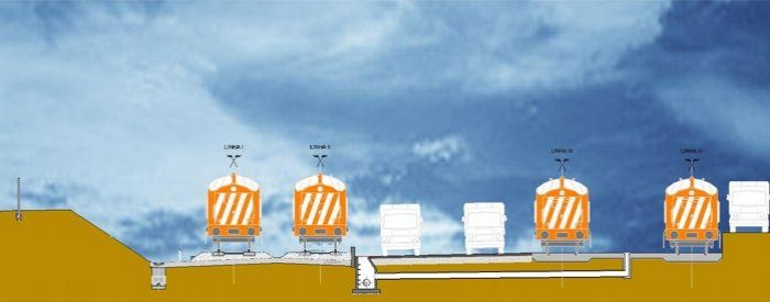 multimodal